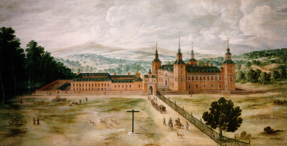 Vista del Palacio Real de El Pardo (ca. 1630) de Jusepe Leonardo. Madrid, Patrimonio Nacional.